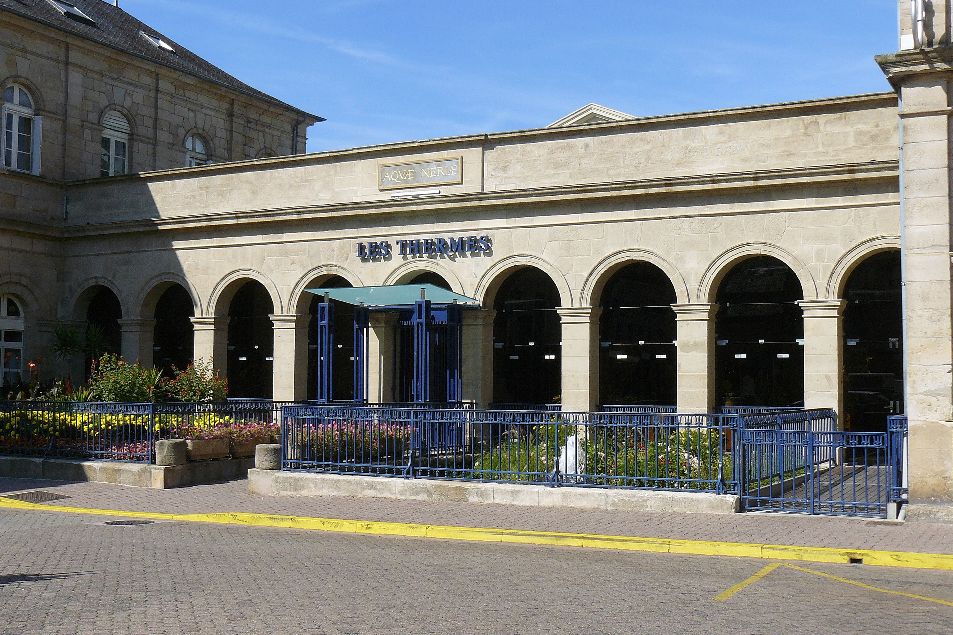 Les Thermes modernes de Néris-les-Bains (Allier, France)